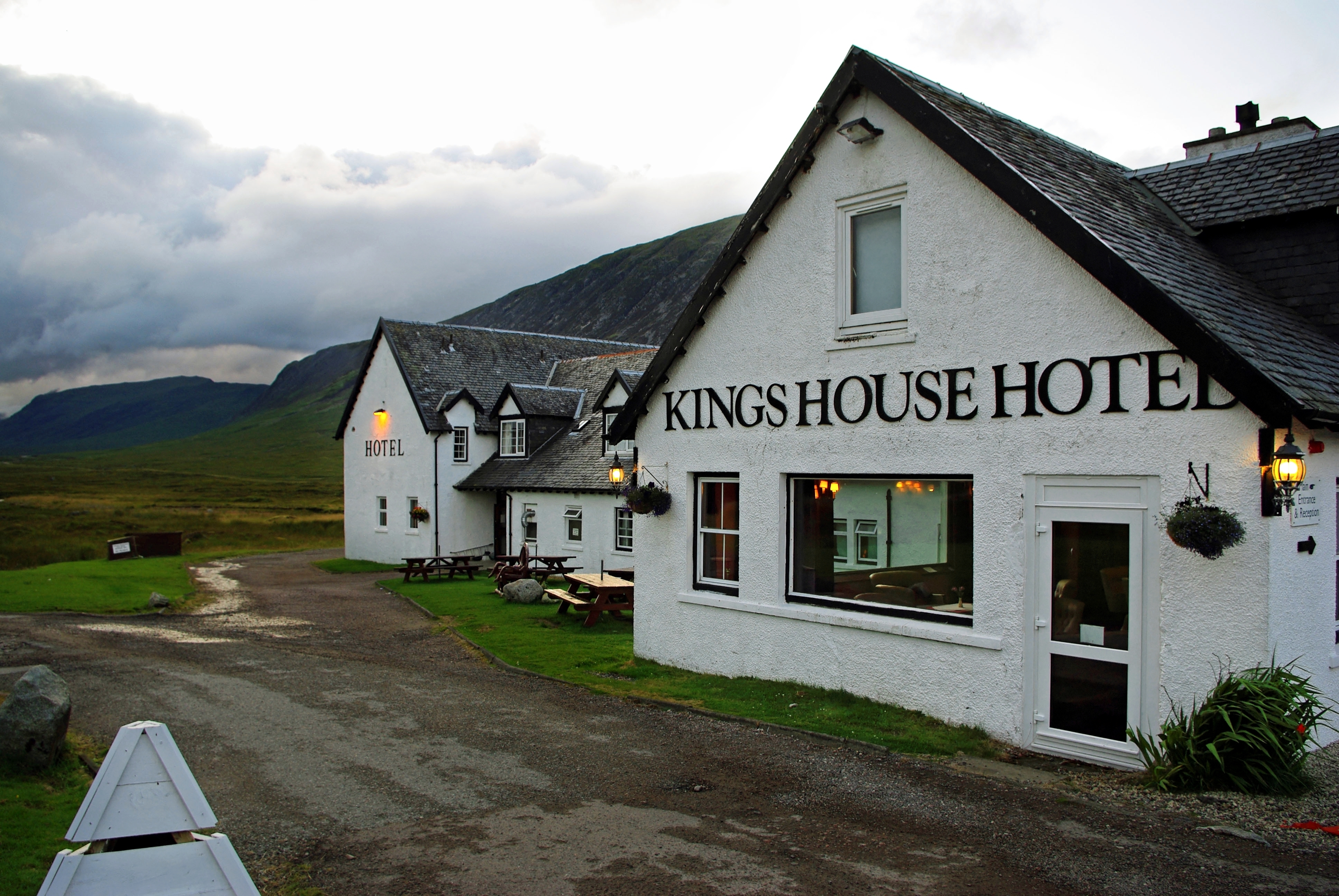 Frontansicht des Kings House Hotels am östlichen Ende von Glencoe, Schottland.